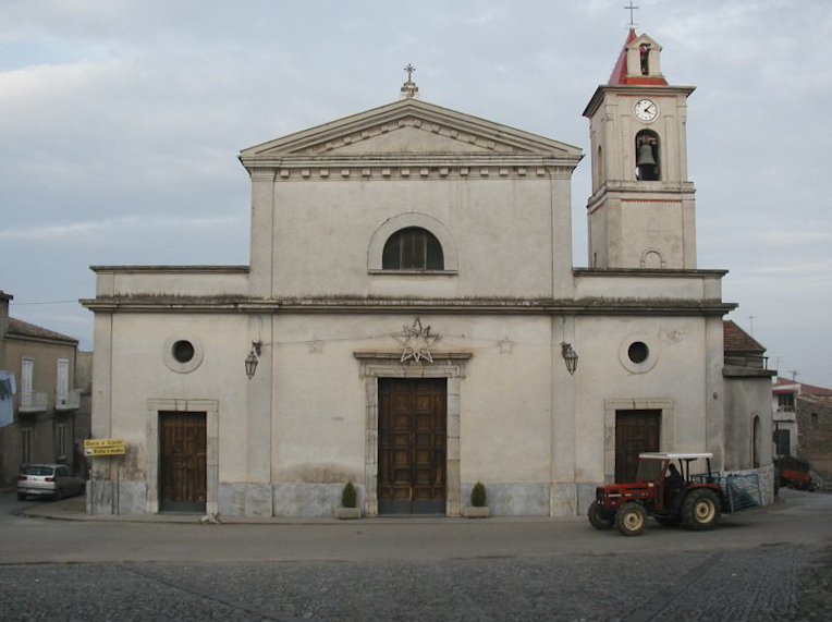 Spezzano Albanese: La Chiesa Madre dei Santi Pietro e Paolo. Foto di Luigino C.